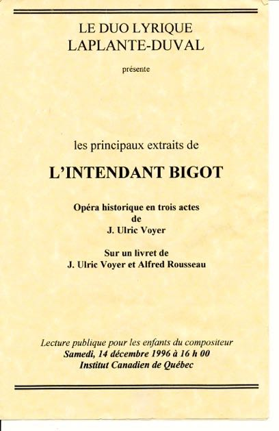 Programme de la lecture publique d'extraits de l'opéra L'Intendant Bigot pour les enfants du compositeur, à l'Institut Canadien de Québec le 14 décembre 1996